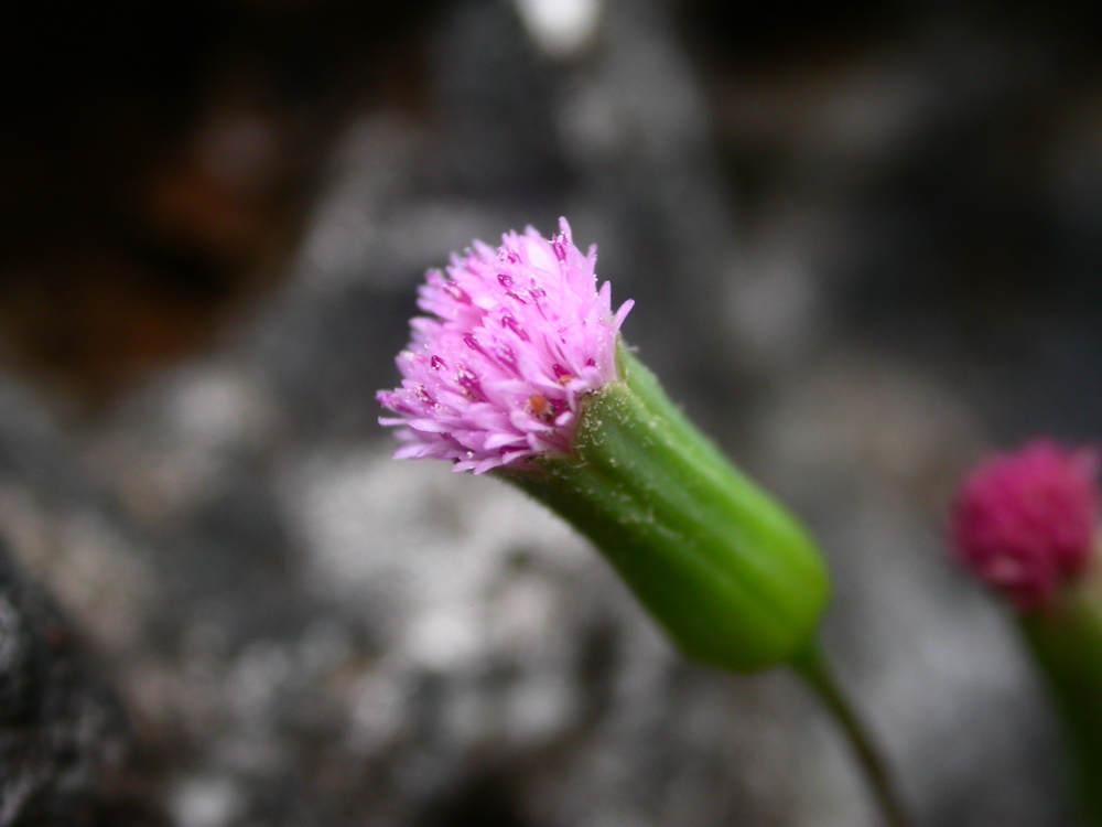 Emilia sonchifolia